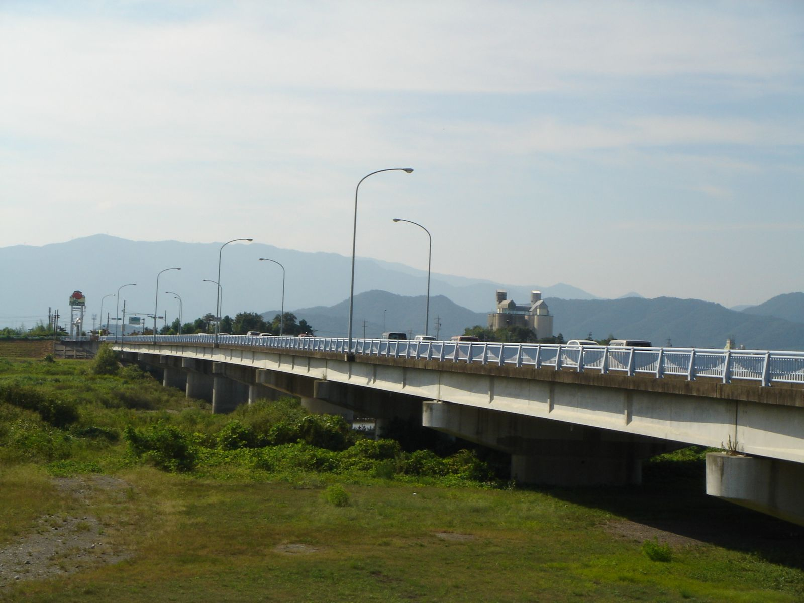 根尾川に架かる薮川橋（国道303号）、岐阜県本巣市の左岸下流側より撮影